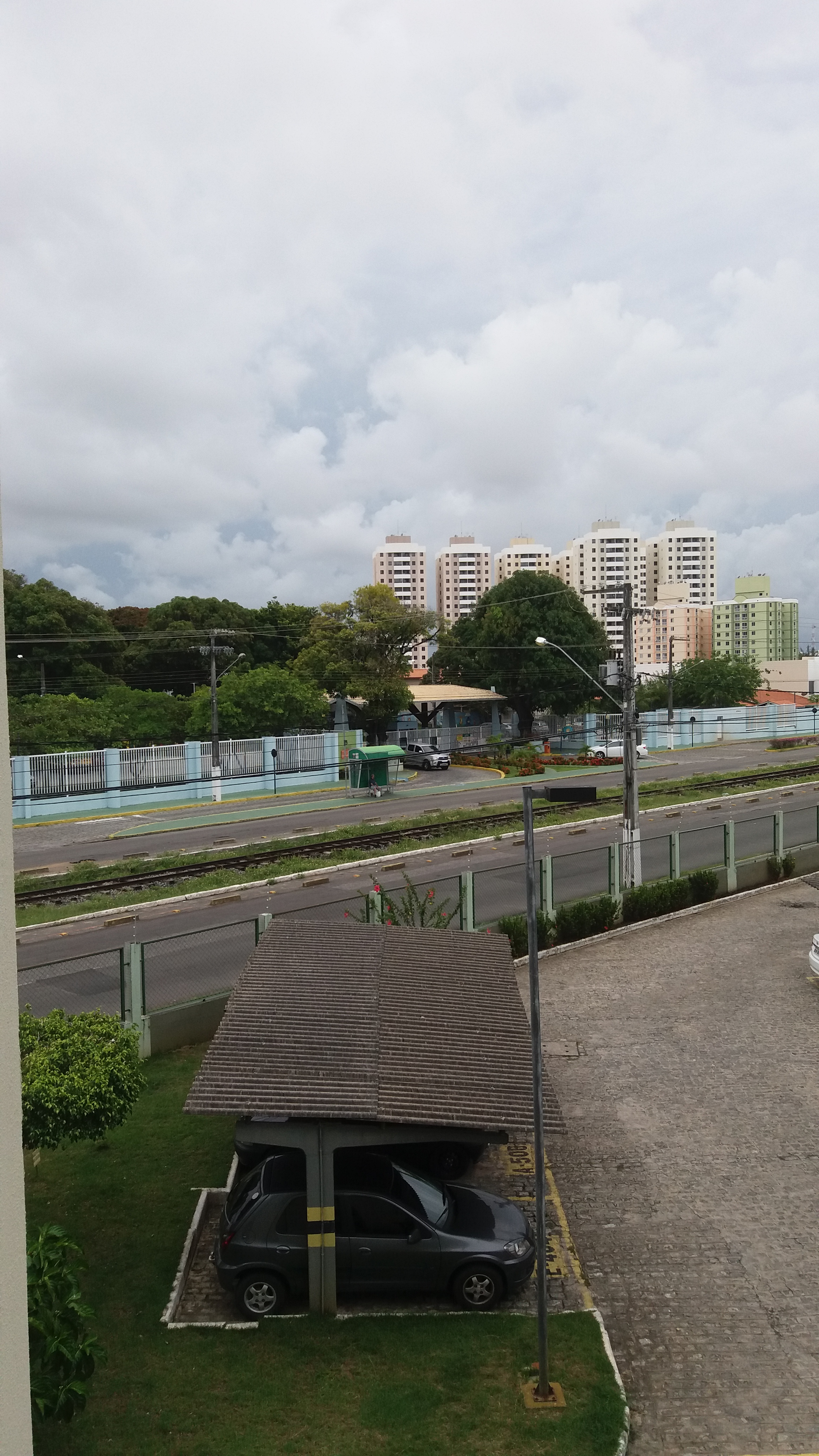 Avenida Rio de Janeiro, na altura do Bairro Ponto Novo, Aracaju-SE, Brasil.